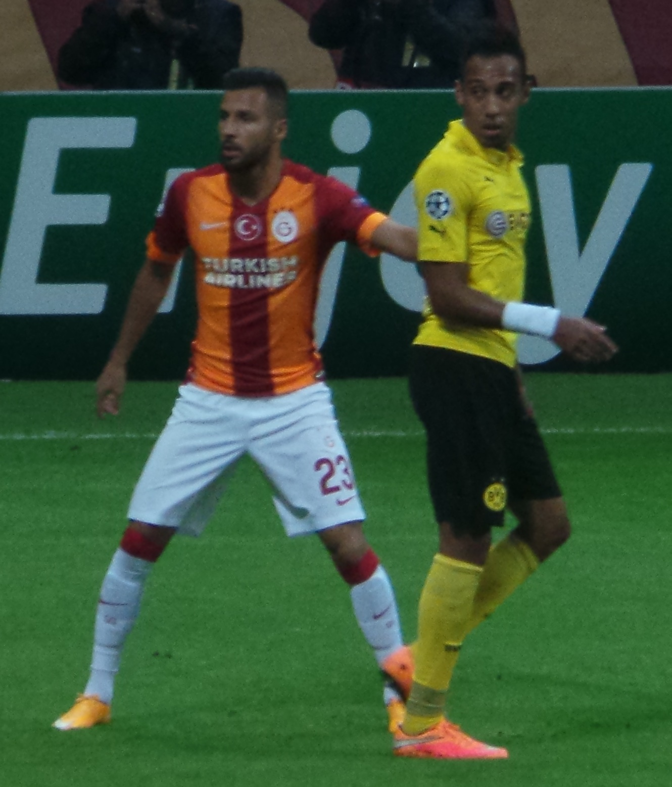 Yasin Öztekin eski takımı Borussia Dormund karşısında Aubameyang ile